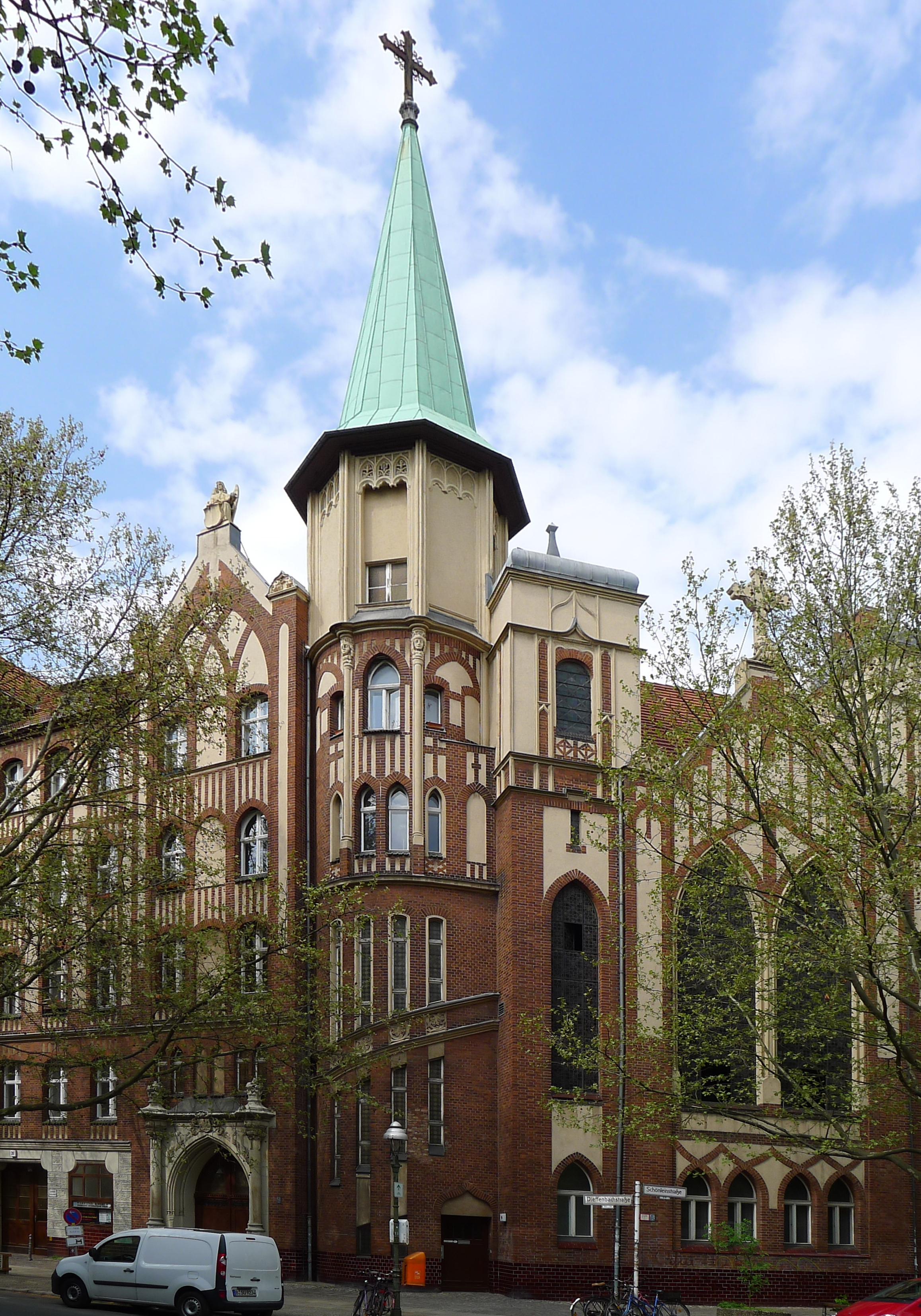 Außenansicht der Kirche